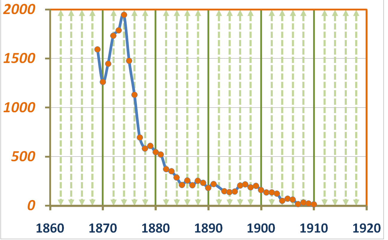 Die örtze ist ein Fluss in Niedersachsen, zwischen Munster und Winsen (Aller). Von 1869 bis zum Beginn des Ersten Weltkrieges wurde hier das Holz auf dem Wege über die Aller nach Bremen geflösst. Das Diagramm gibt eine Übersicht über die Anzahl der jährlichen Flöße auf der Örtze.